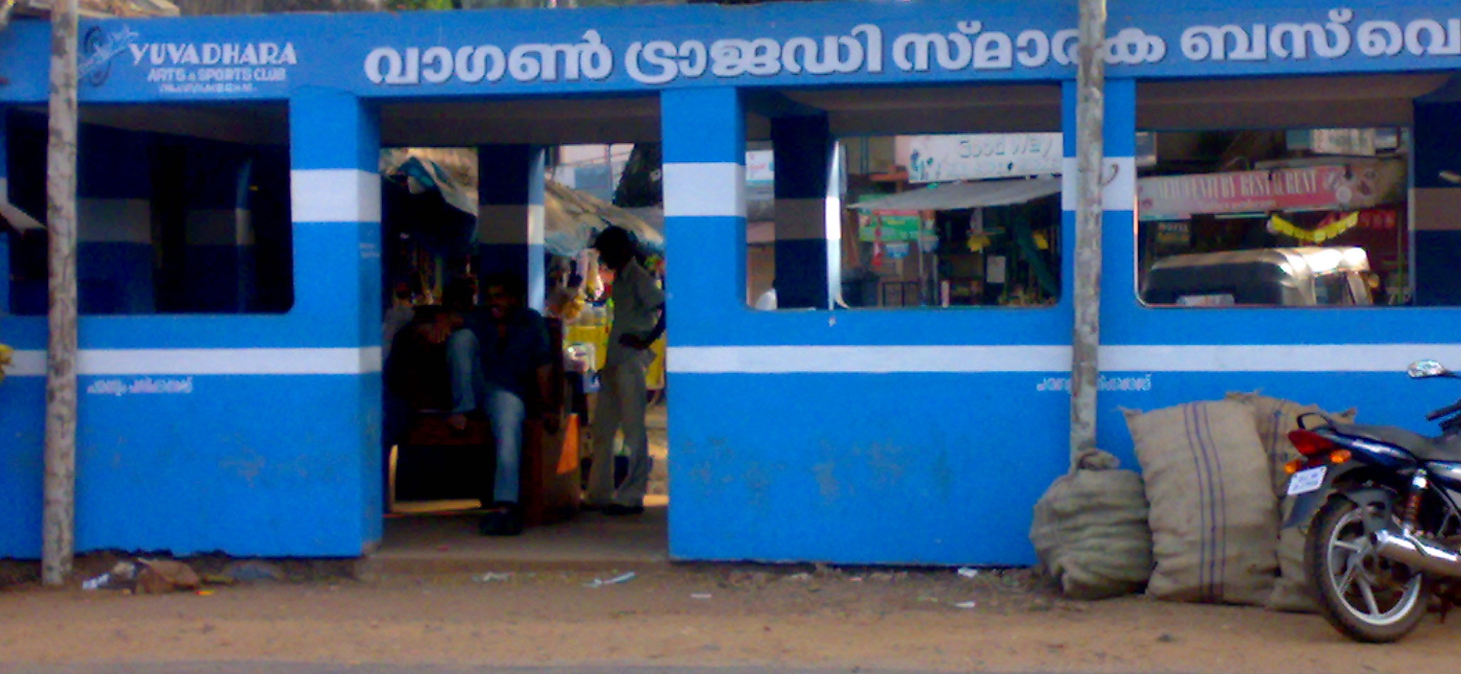 Wagon Tragedy Memorial Bus Stop Velluvambram Pookkottur,1921 ൽ മലബാർ കലാപ വേളയിൽ ബ്രിട്ടീഷ് പട്ടാളം പിടികൂടിയ സമര പോരാളികളുമായി തിരൂരിൽ നിന്നും കോയമ്പത്തൂരിലേക്ക് റെയിൽവേയുടെ ചരക്ക് തീവണ്ടി പുറപ്പെട്ടു. എം എസ് എം - എൽ വി 1711 എന്ന മദ്രാസ് സൗത്ത് മറാഠ കമ്പനിയുടെ വായു കടക്കാത്ത വാഗണിലാണ് സമരക്കാരെ കുത്തിനിറച്ച് കൊണ്ട് പോയത്. അടച്ച് പൂട്ടിയ വാഗണിൽ 100 ൽ പരം ആളുകളൂണ്ടായിരുന്നു. 64 പേർ ശ്വാസം മുട്ടി മരണപ്പെട്ടു. 1921 നവമ്പർ 20 നായിരുനു ഈ സംഭവം നടന്നത്. ക്രൂരമായ ഈ കൂട്ടക്കൊലയുടെ സ്മരണക്കായി നിർമിക്കപ്പെട്ട സ്മാരകമാണ് വാഗൺ മാതൃകയിലുള്ള ബസ് കാത്തിരിപ്പു കേന്ദ്രം. വാഗൺ ട്രാജഡി ദുരന്തത്തിനു കാരണക്കാരനായ അന്നത്തെ പോലിസ് സൂപ്രണ്ട് ഹിച്ച്കോക്കിന്റെ സ്മാരകം ഇവിടെ നിലനിന്നിരുന്നു. സ്വാതന്ത്രത്തിനു ശേഷം ഹിച്ച്കോക്ക് സ്മാരകം പൊളിച്ച് നീക്കണമെന്നാവശ്യപ്പെട്ട് ബഹുജന പ്രക്ഷോപം ആരംഭിക്കുകയും പിന്നീട് 1969 ൽ അത് പൊളിച്ച് മാറ്റുകയും തൽസ്ഥാനത്ത് ഈ കാണുന്ന സ്മാരകം നിർമിക്കുകയും ചെയ്തു.